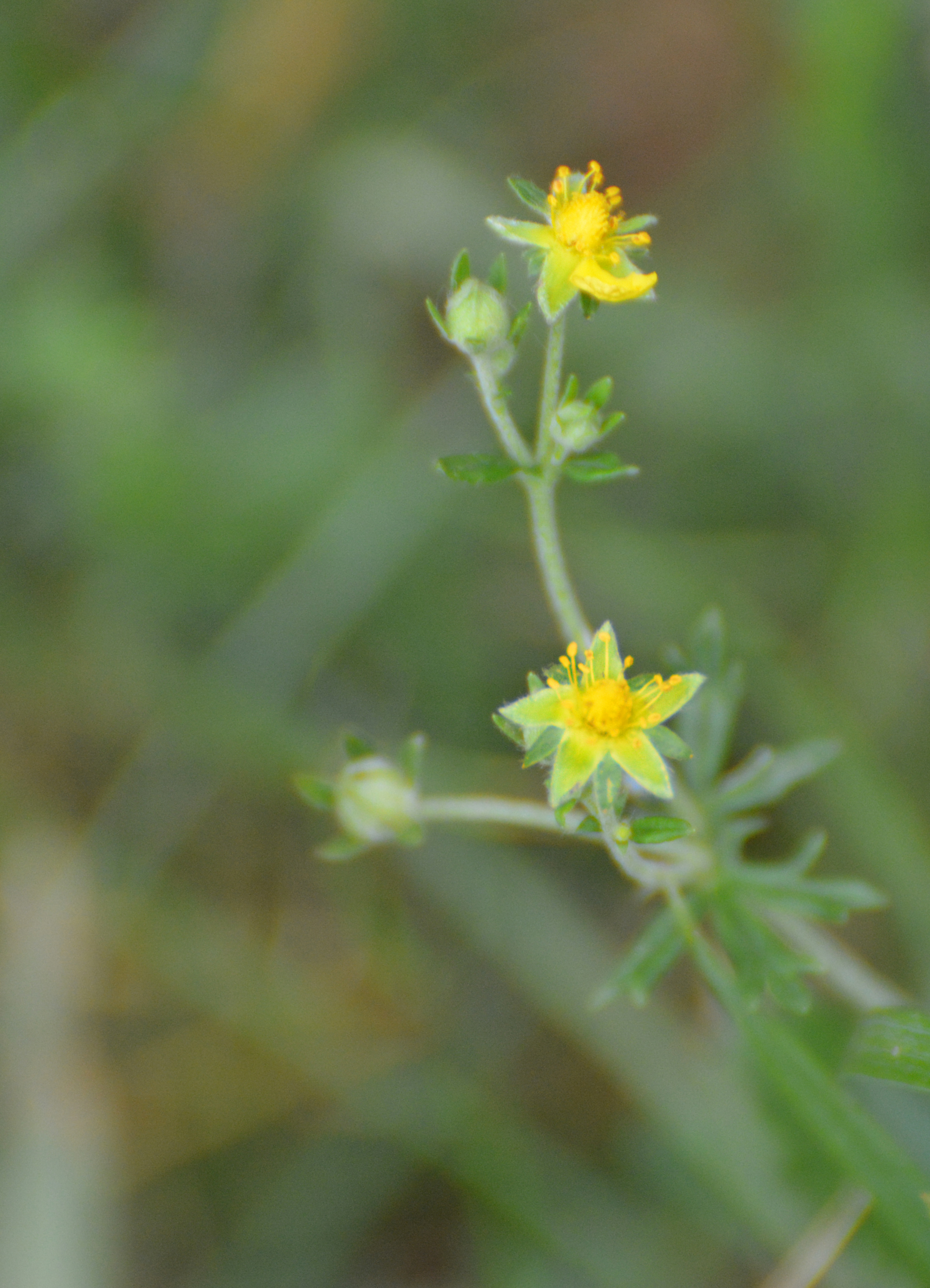 Vier „Schanzen“ This media shows the natural monument in Vienna with the ID 695.